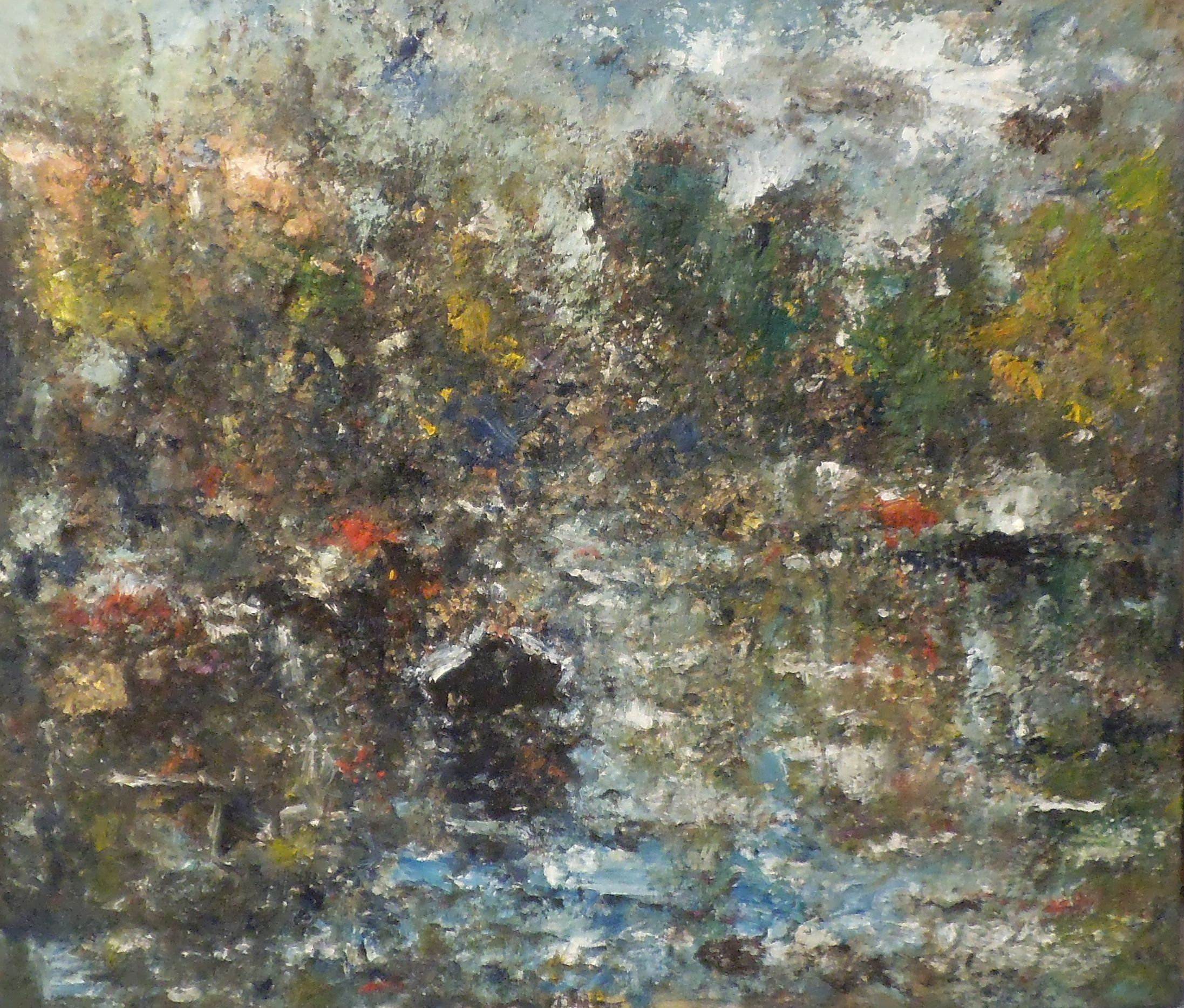 Canal (120 x 140 cm)